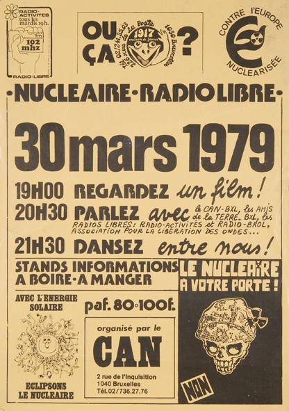 Radio-Activités - radios libres en Belgique